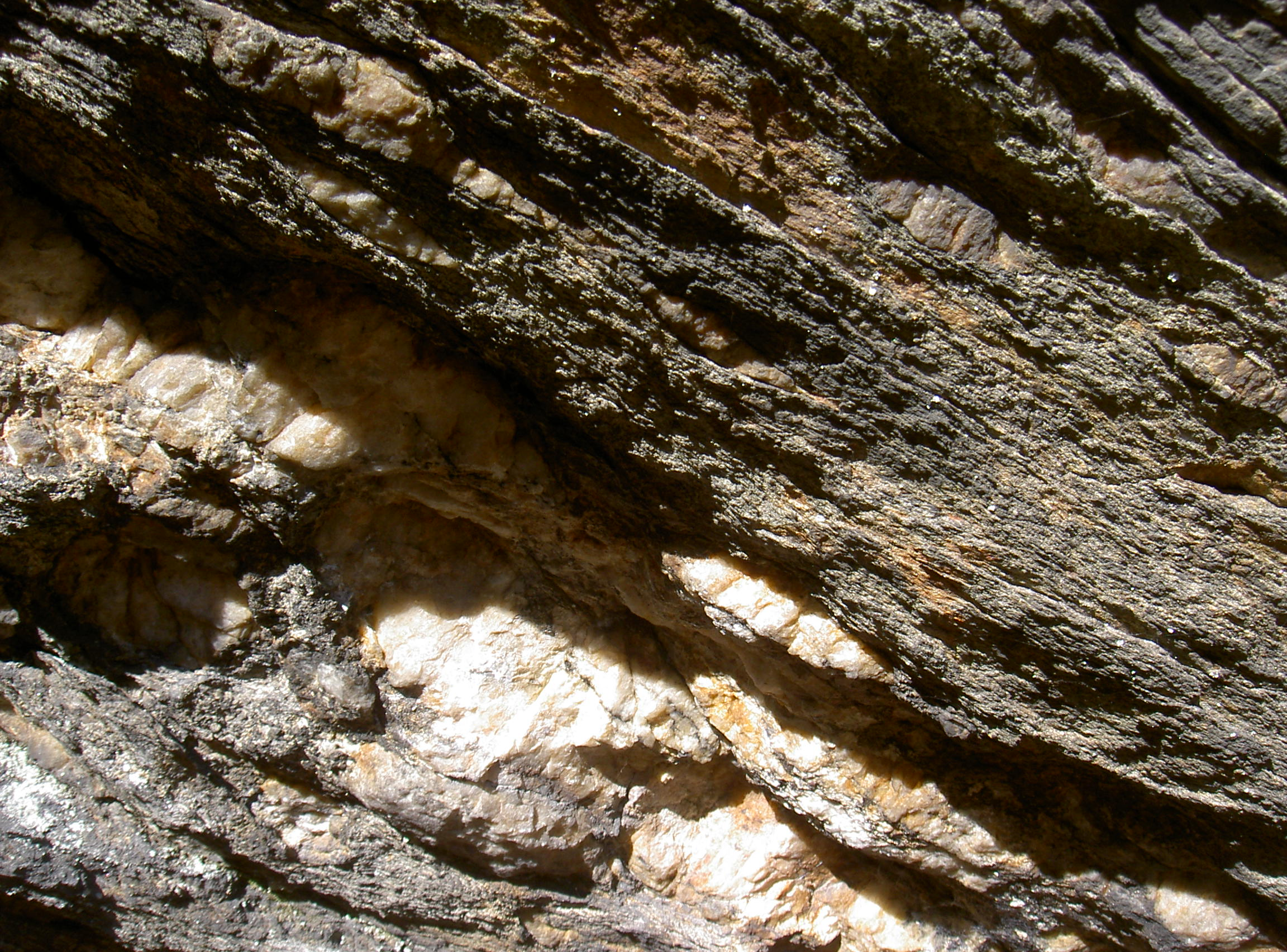 Gneisfelsen bei Altenschneeberg